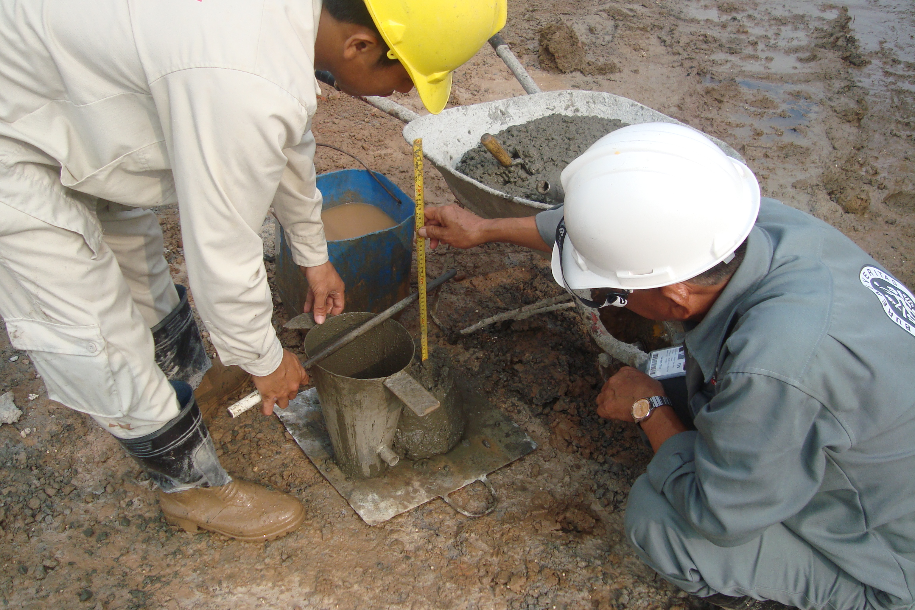 Hình tự chụp